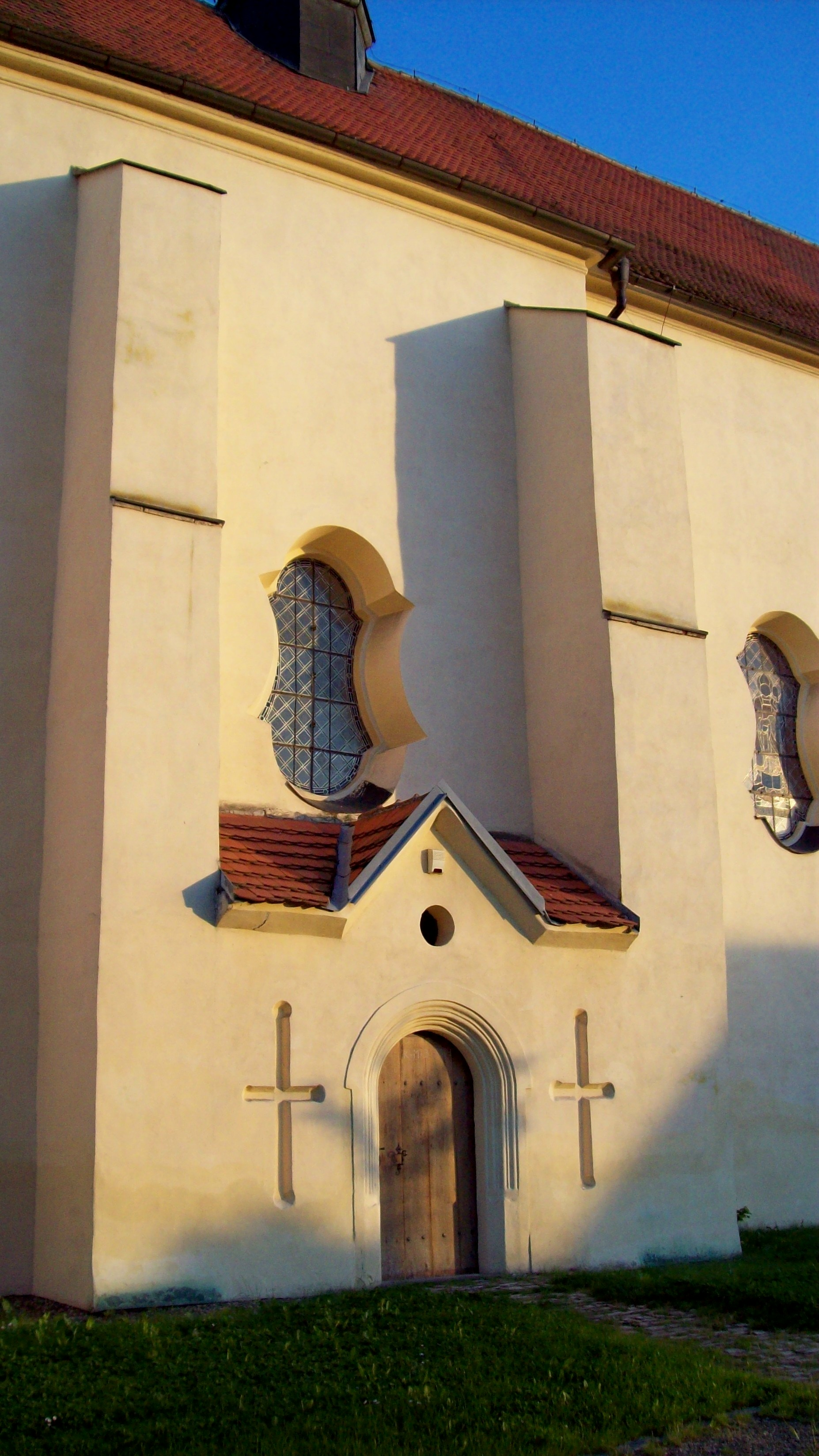 Kostel sv. Vavřince, ul. Českolipská 1111, Mělník-Pšovka.